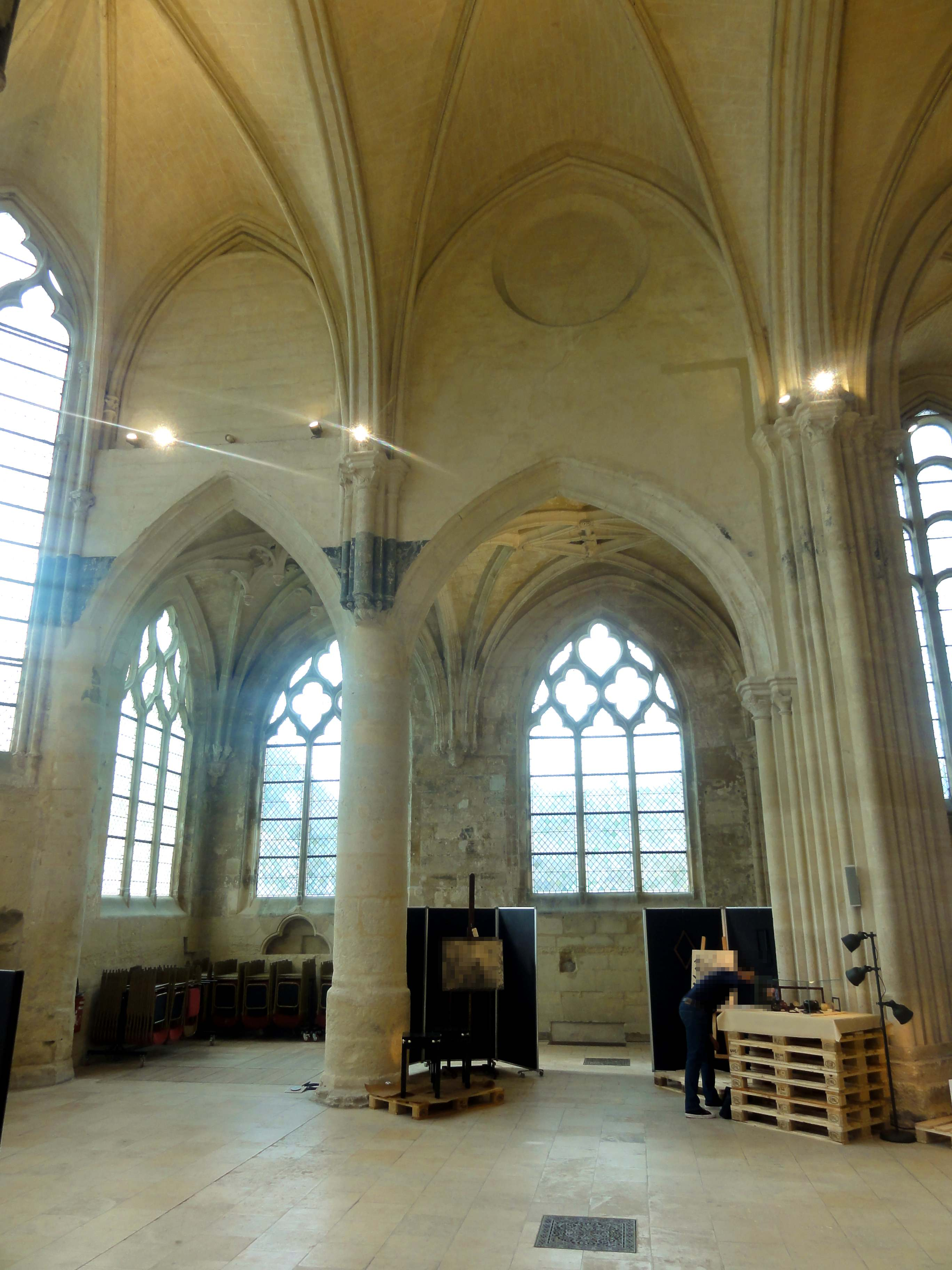 Intérieur de l'église - voir titre.